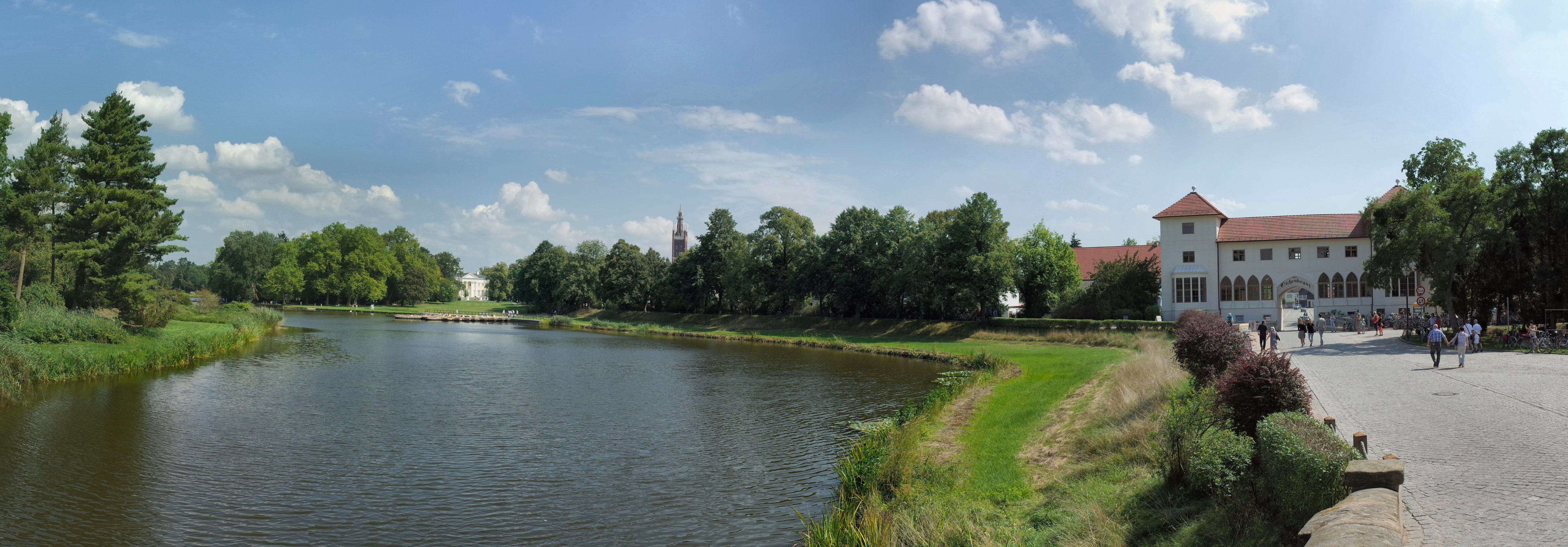 Wörlitzer Anlagen. Wörlitzer See, Schloss, Bibelturm (St. Petrikirche) und Gasthof zum Eichenkranz (Baudenkmal im Denkmalverzeichniss Sachsen-Anhalt, Erfassungsnummer: 094 40509 000 000 000 000 [1])